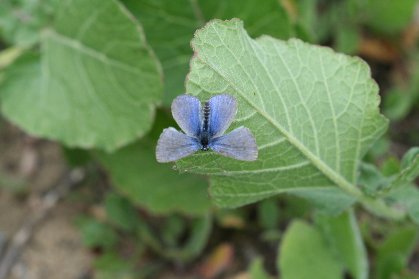 . Jane Hendron/USFWS